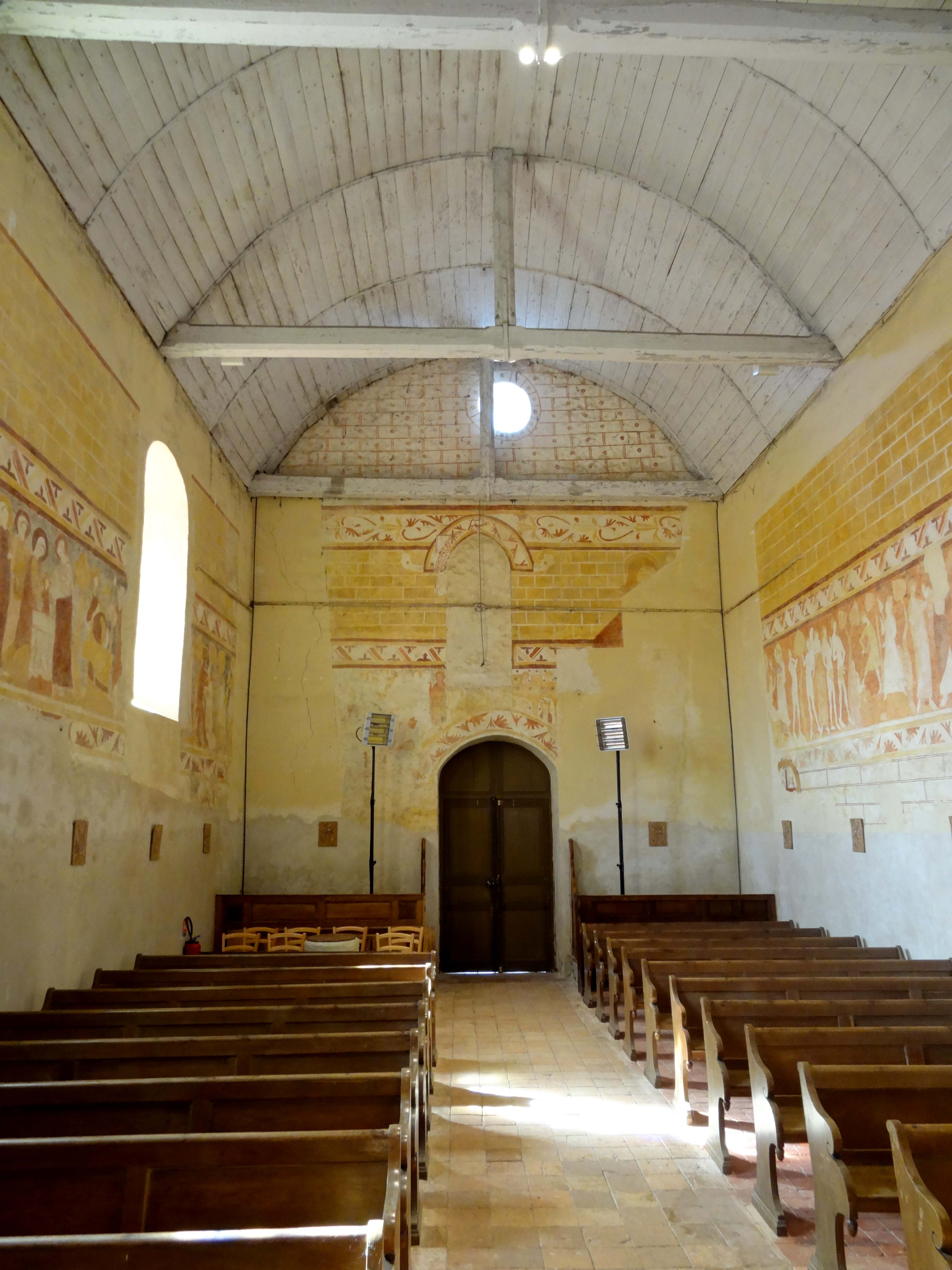 Intérieur de l'église - voir titre.